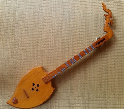 Taja Pinaŭo.